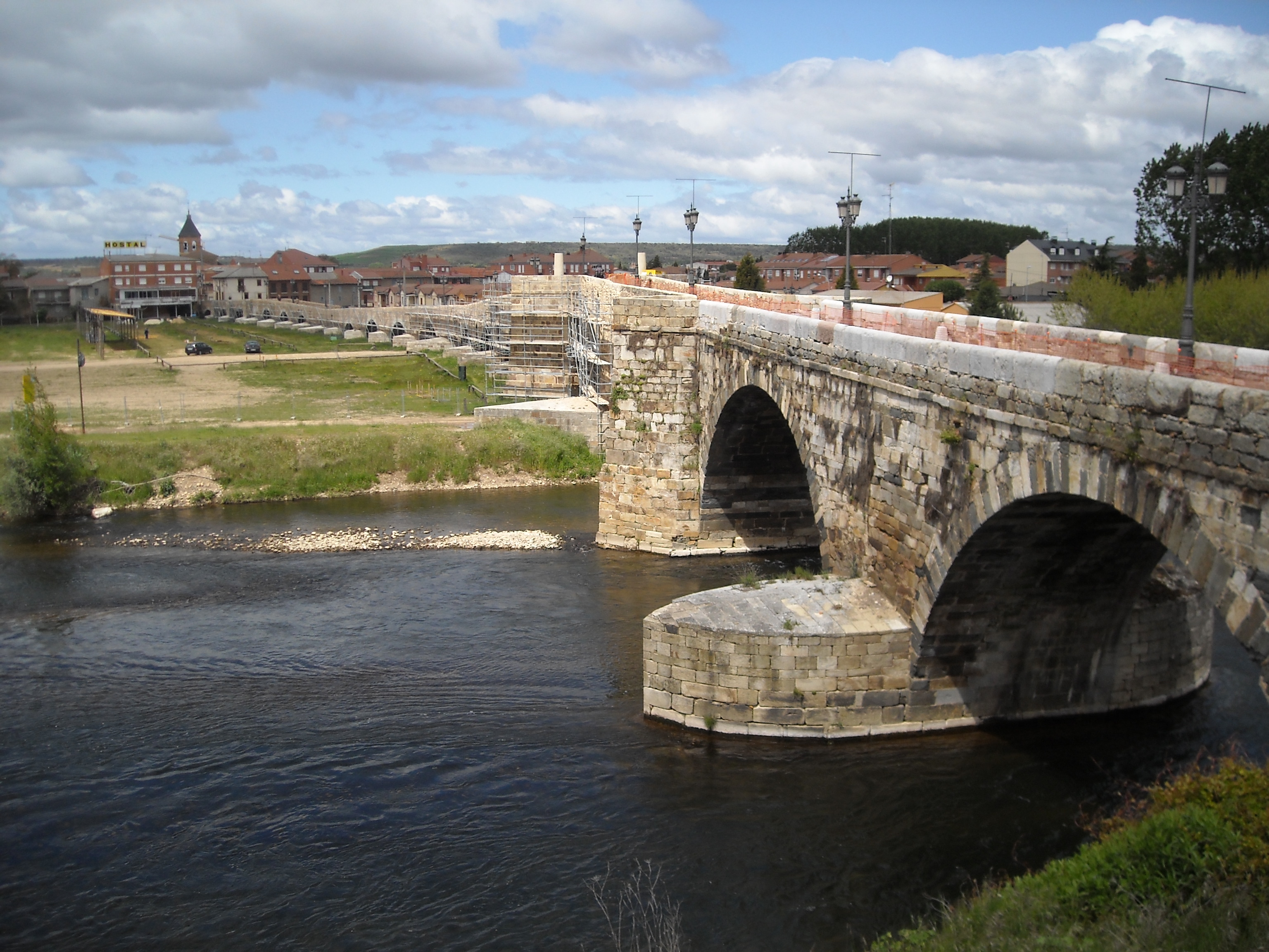 Ponte sul fiume Órbigo, Hospital de Órbigo, León, Spagna